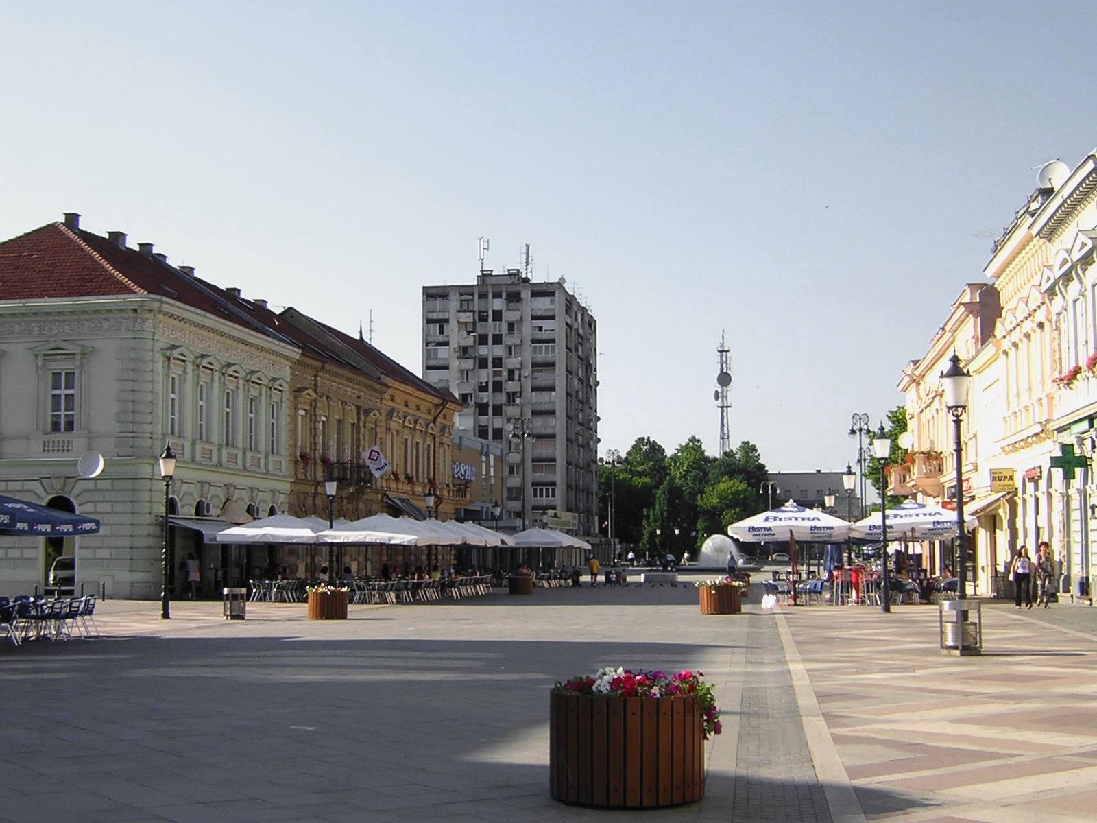 Hauptplatz von Slavonski Brod (Korso)